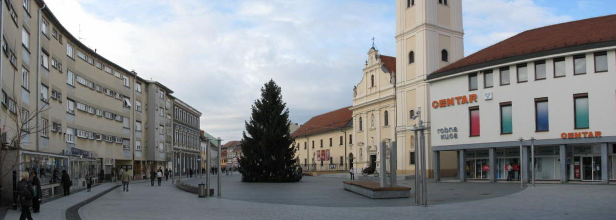 Čakovec, Franjevački trg, panorama This panoramic image was created with Autostitch (stitched images may differ from reality).